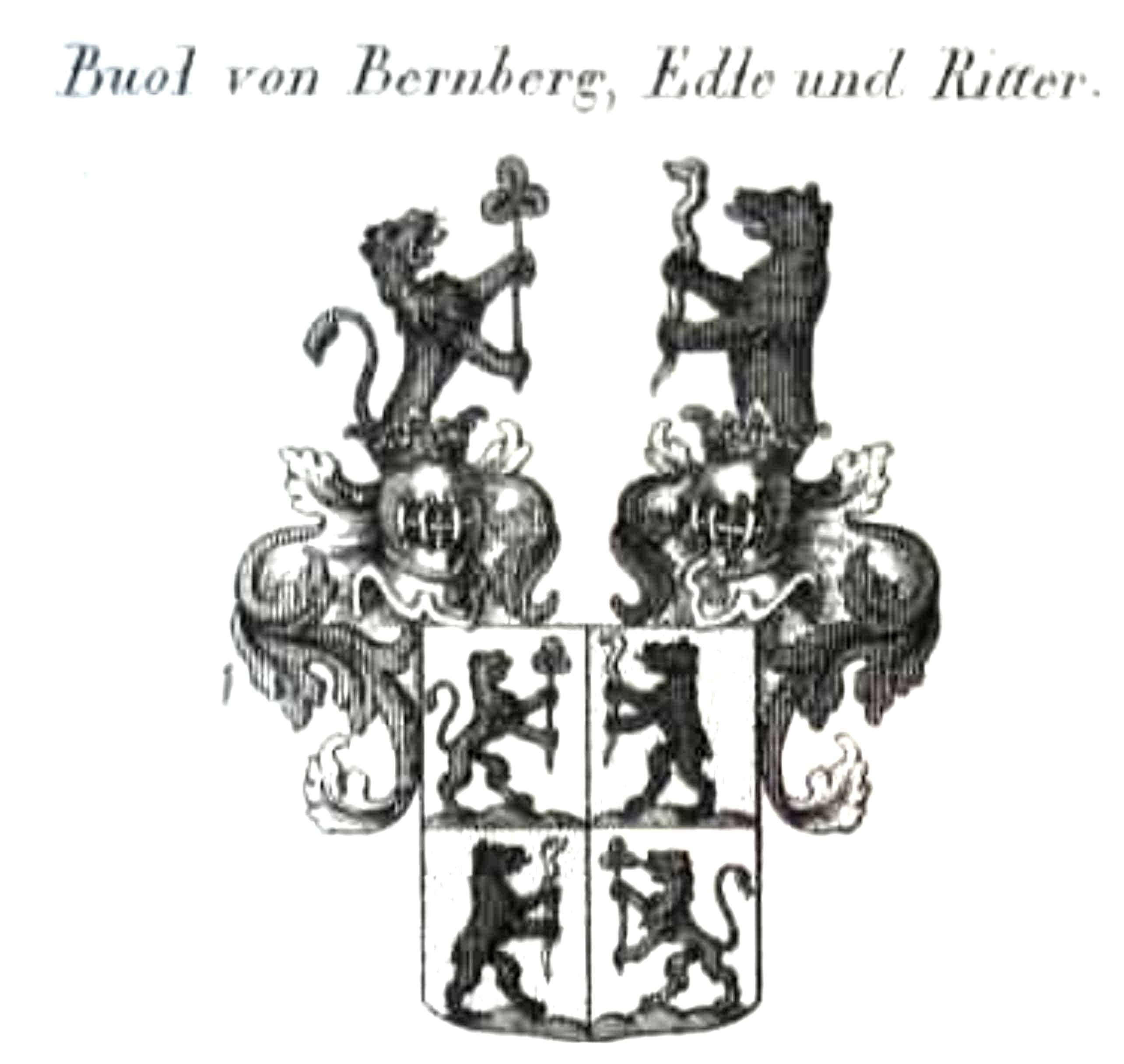 Wappen Buol von Bernberg (Berenberg), Edle und Ritter Kupferstich, Blatt: 20,5 x 12 cm